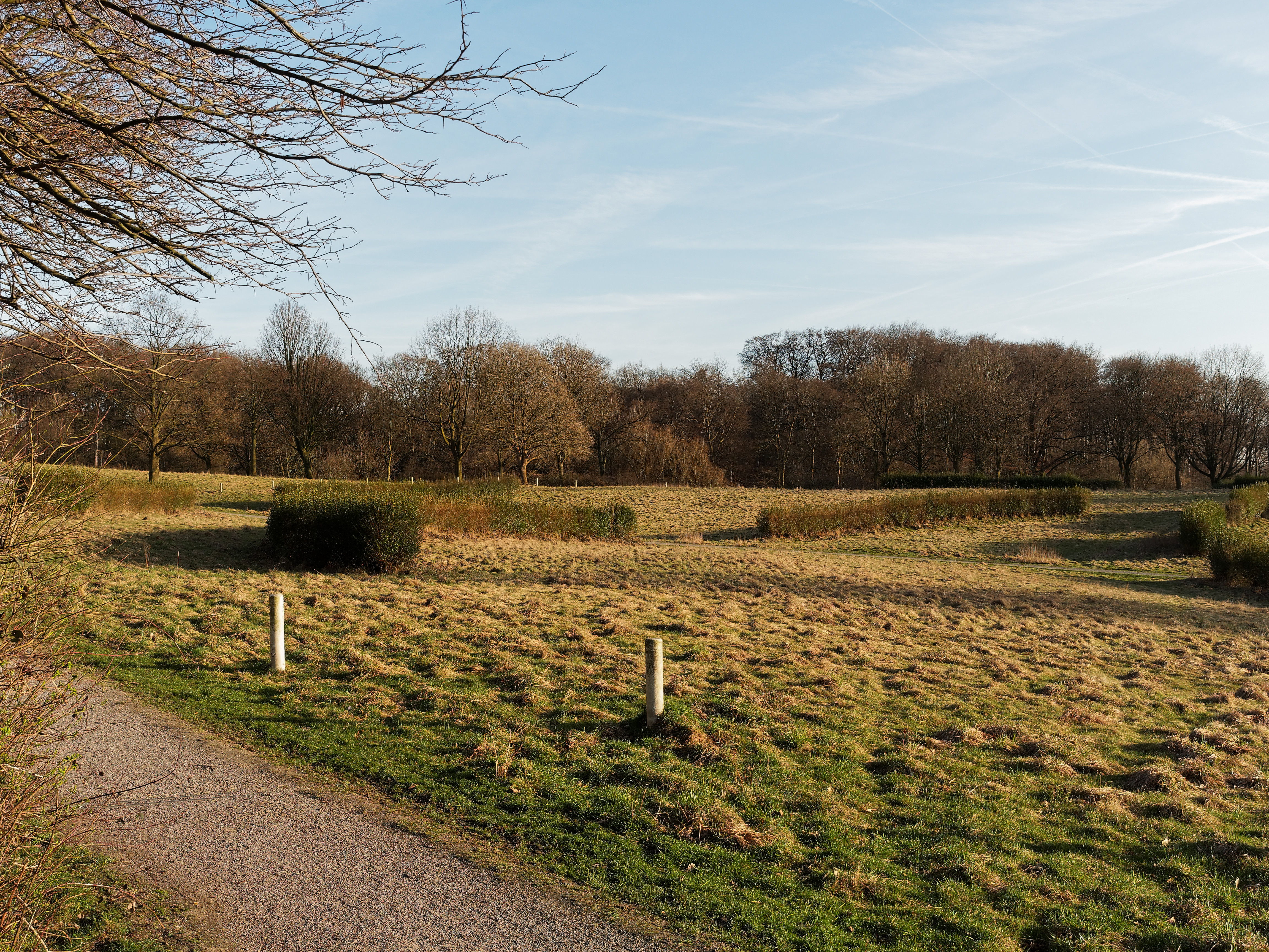 Die Naturhindernis-Pferderennbahn in Castrop an der Dortmunder Straße, Bahnverlauf und Hindernisse. Denkmal